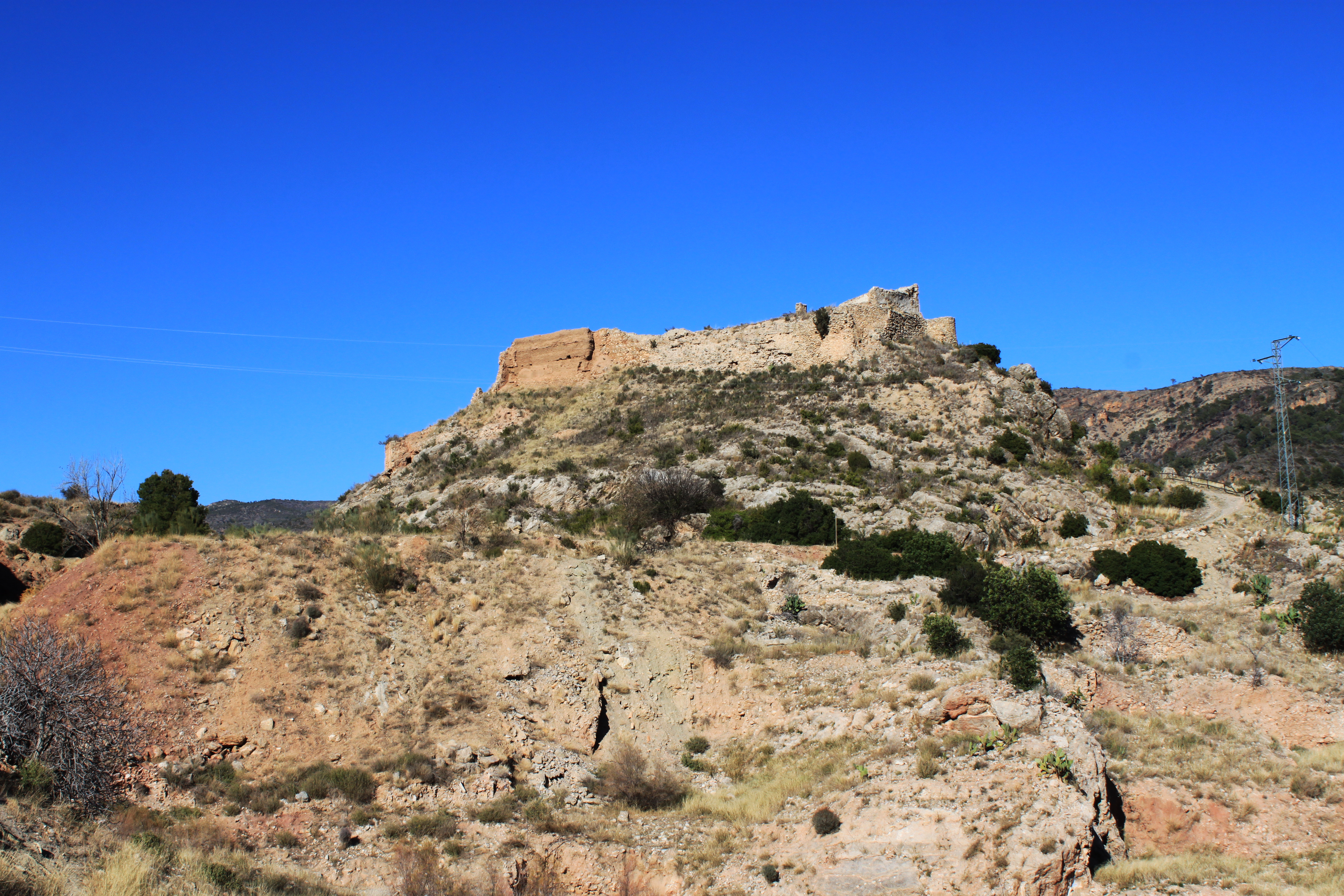 Castillo de Domeño y antiguo emplazamiento de la villa, provincia de Valencia, Comunidad valenciana, España.